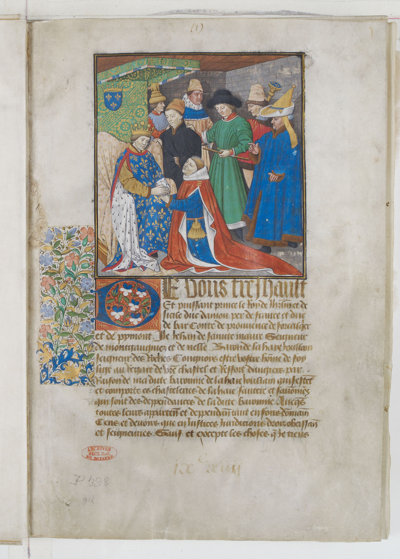 Première page de l'aveu rendu à René, roi de Jérusalem et de Sicile, duc d'Anjou, pair de France, duc de Bar, comte de Provence, de Forcalquier et de Piémont, par Jean de Sainte-Maure, seigneur de Montgauguier et de Nesle, baron de La Haie-Joullain, et par Charles, son fils, pour la baronnie de La Haie-Joullain en Anjou. Page ornée d'une miniature représentant le vassal à genoux, tête nue, rendant hommage à son suzerain, dont les traits sont ceux de René.